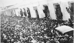 Caída de Manuel Estrada Cabrera en 1920: el pueblo se agolpó en las afueras de la Asamblea Nacional para enterarse de la designación del ciudadano Carlos Herrera como presidente.